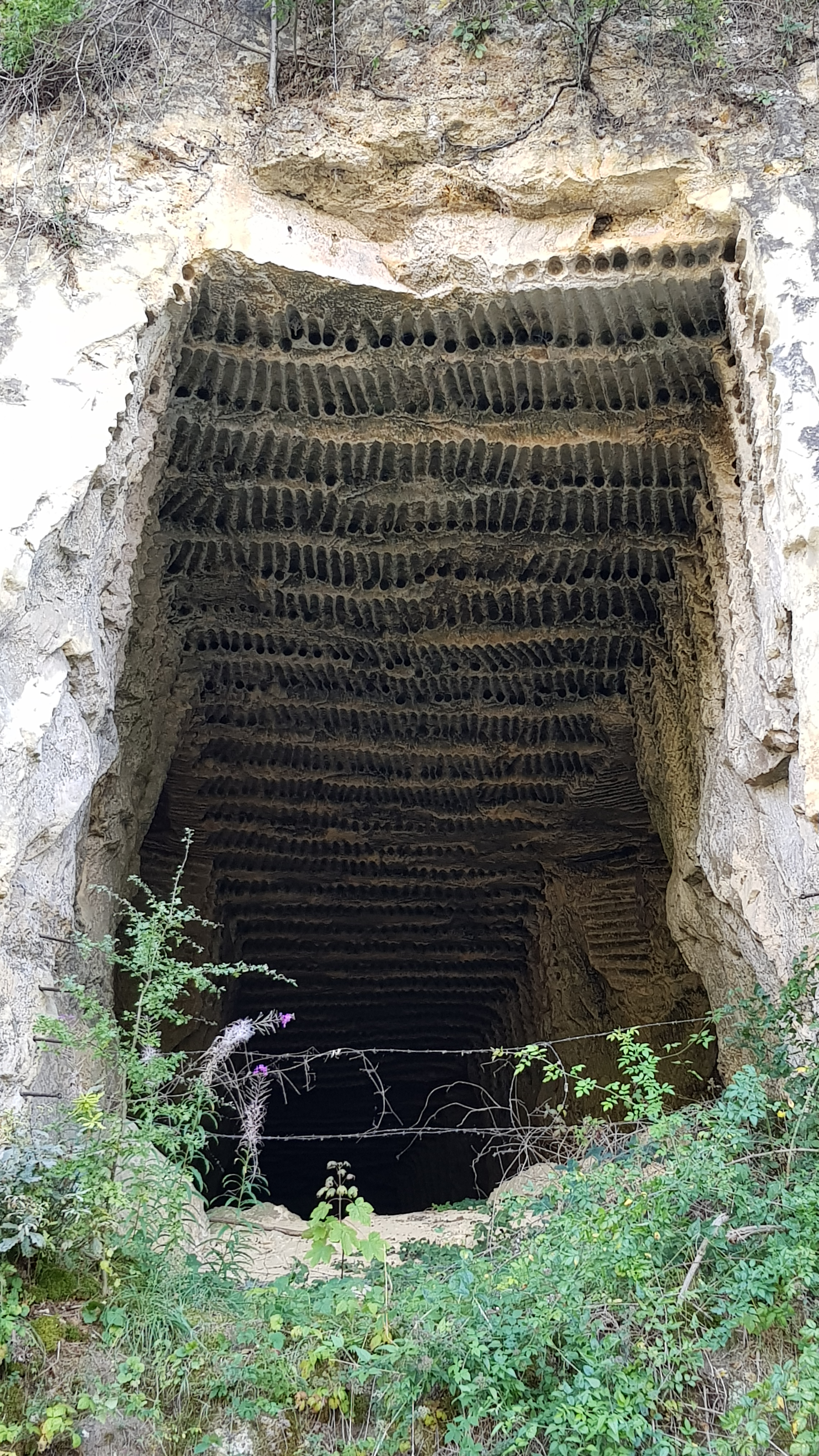 Groeve Mathus, Kanne, België